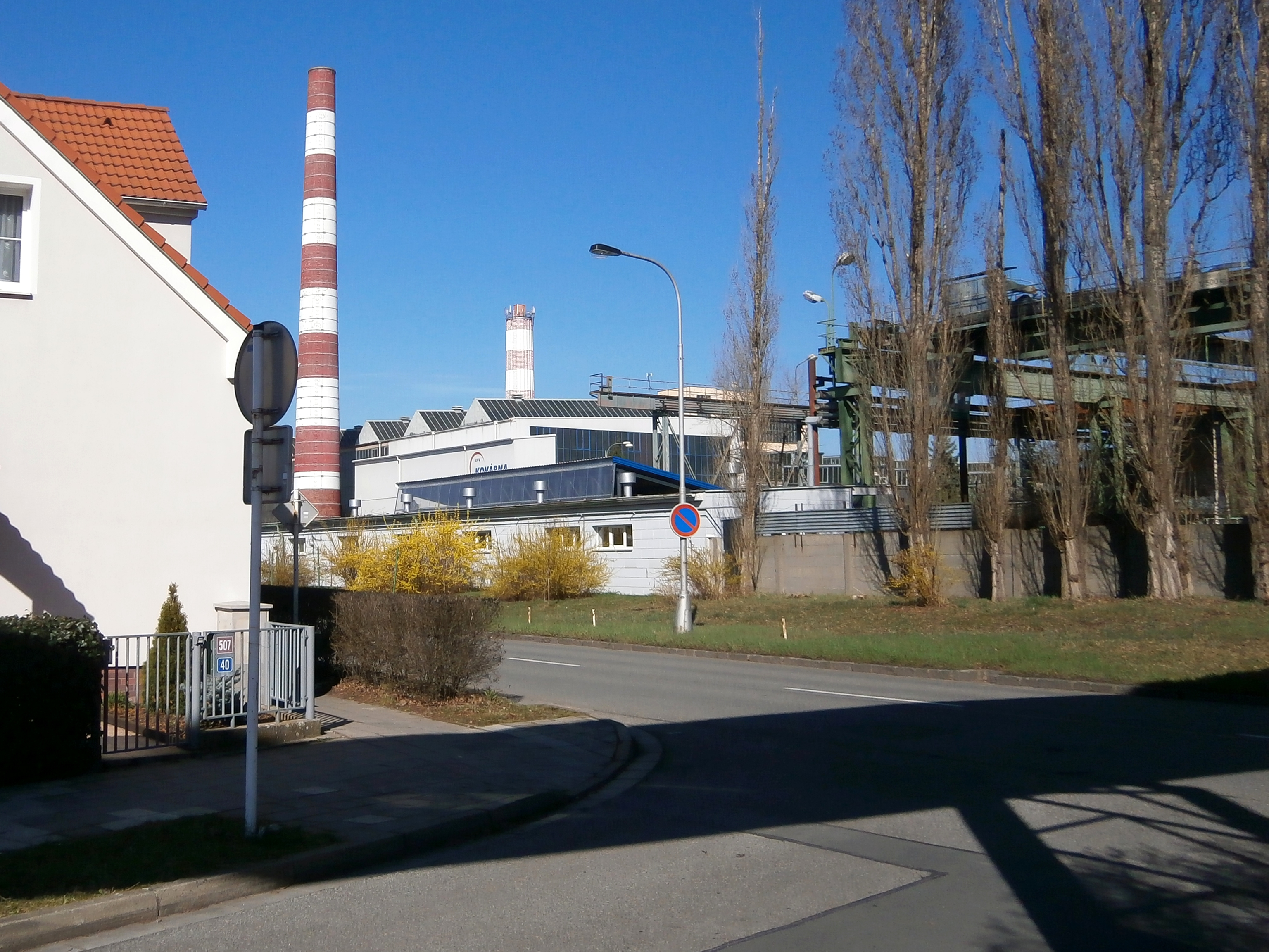 Areál ZVU, bývalých Závodů Vítězného února